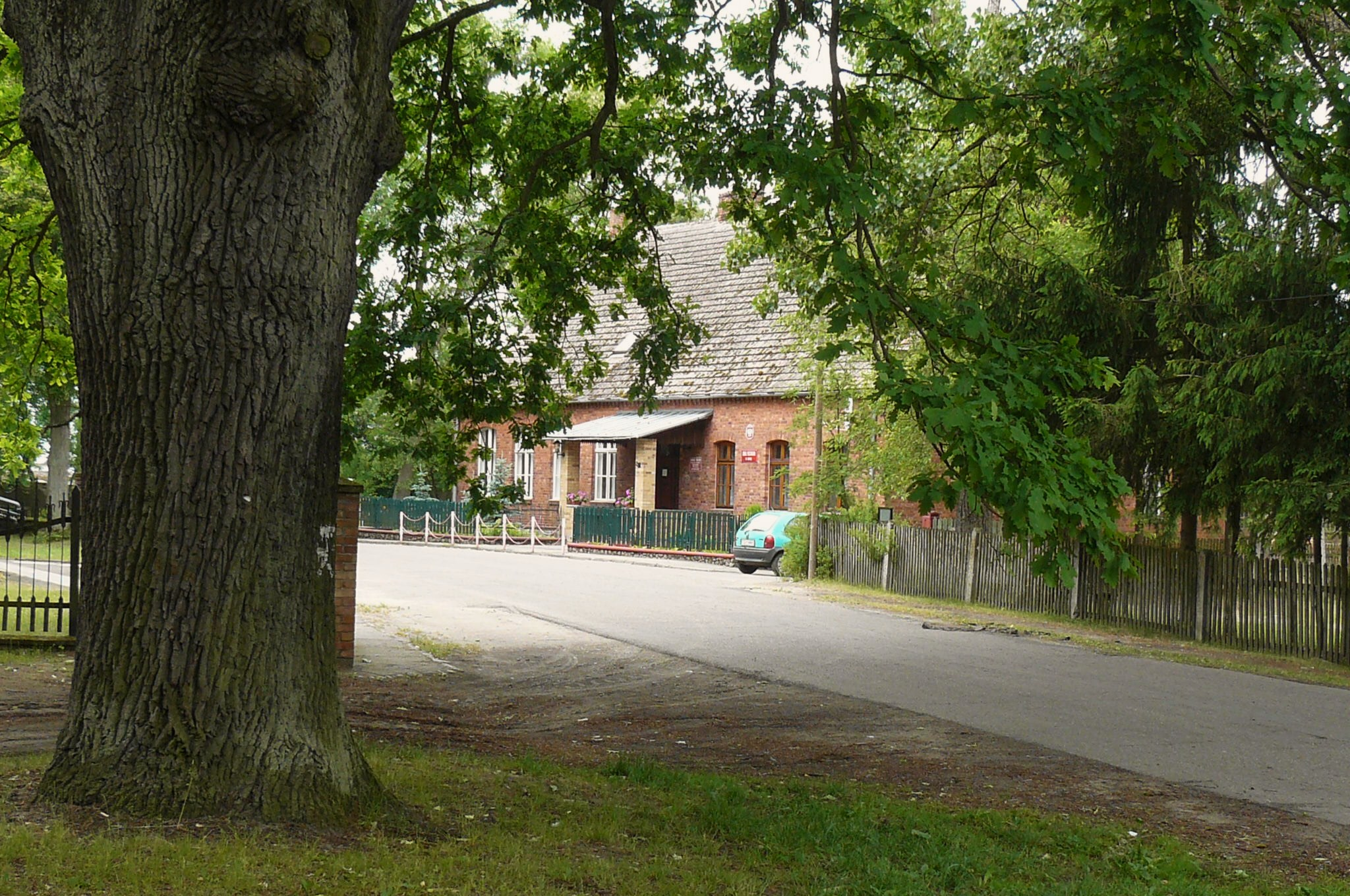 Rąpin - gm. Drezdenko. Stara szkoła.